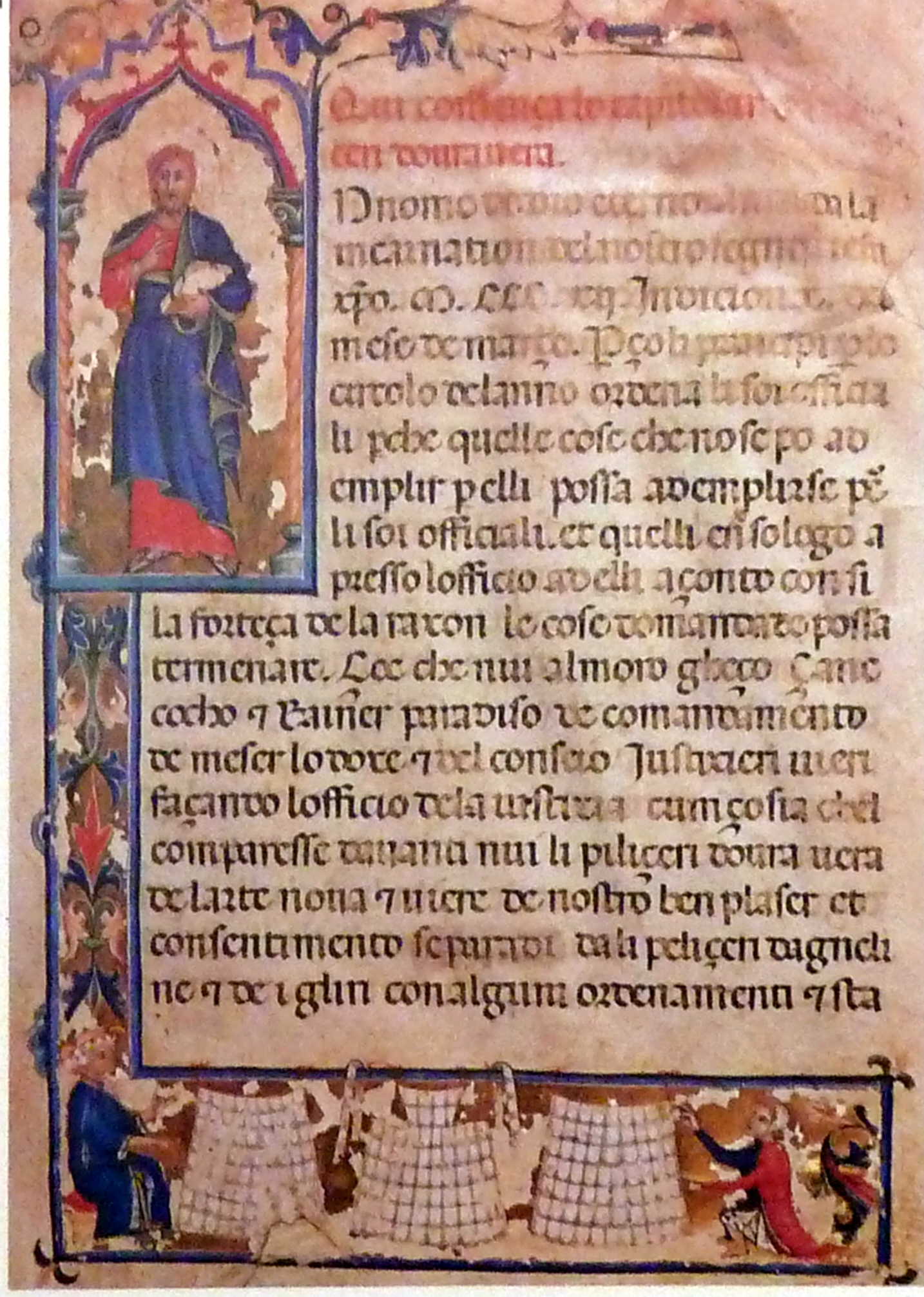 Mariegola dei Varoteri (pellicciai), Venezis, Museo Correr